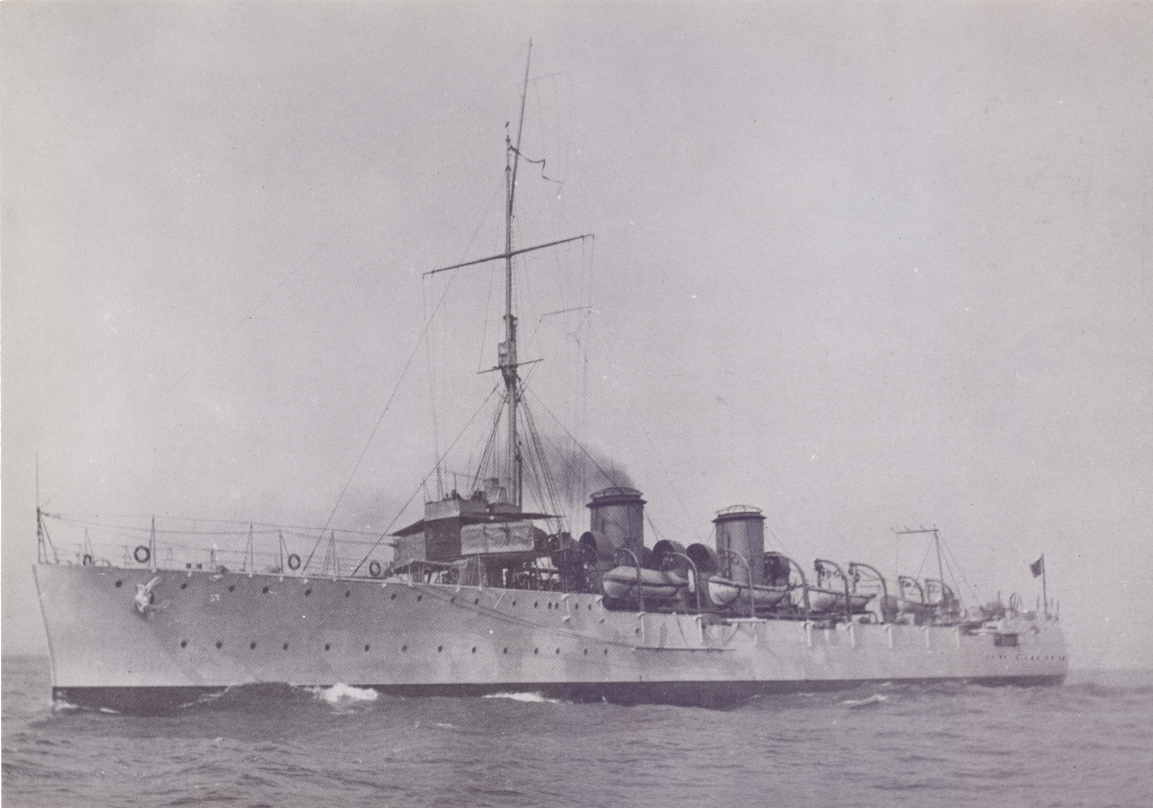 Cruzador Bahia. Foi o capitânia da D.N.O.G. (Divisão Naval em Operações de Guerra) desde a partida de Dacar em 3 de novembro de 1918 até o final da comissão. Arquivo liberado pela Marinha do Brasil através de projeto GLAM com Wiki Educação Brasil